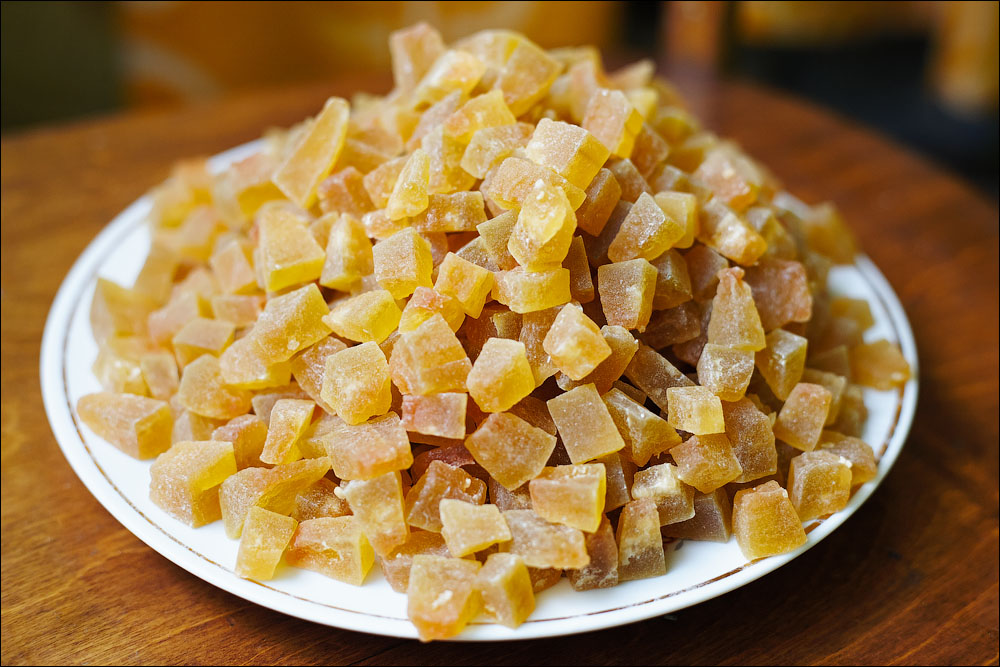 Из арбузной корки